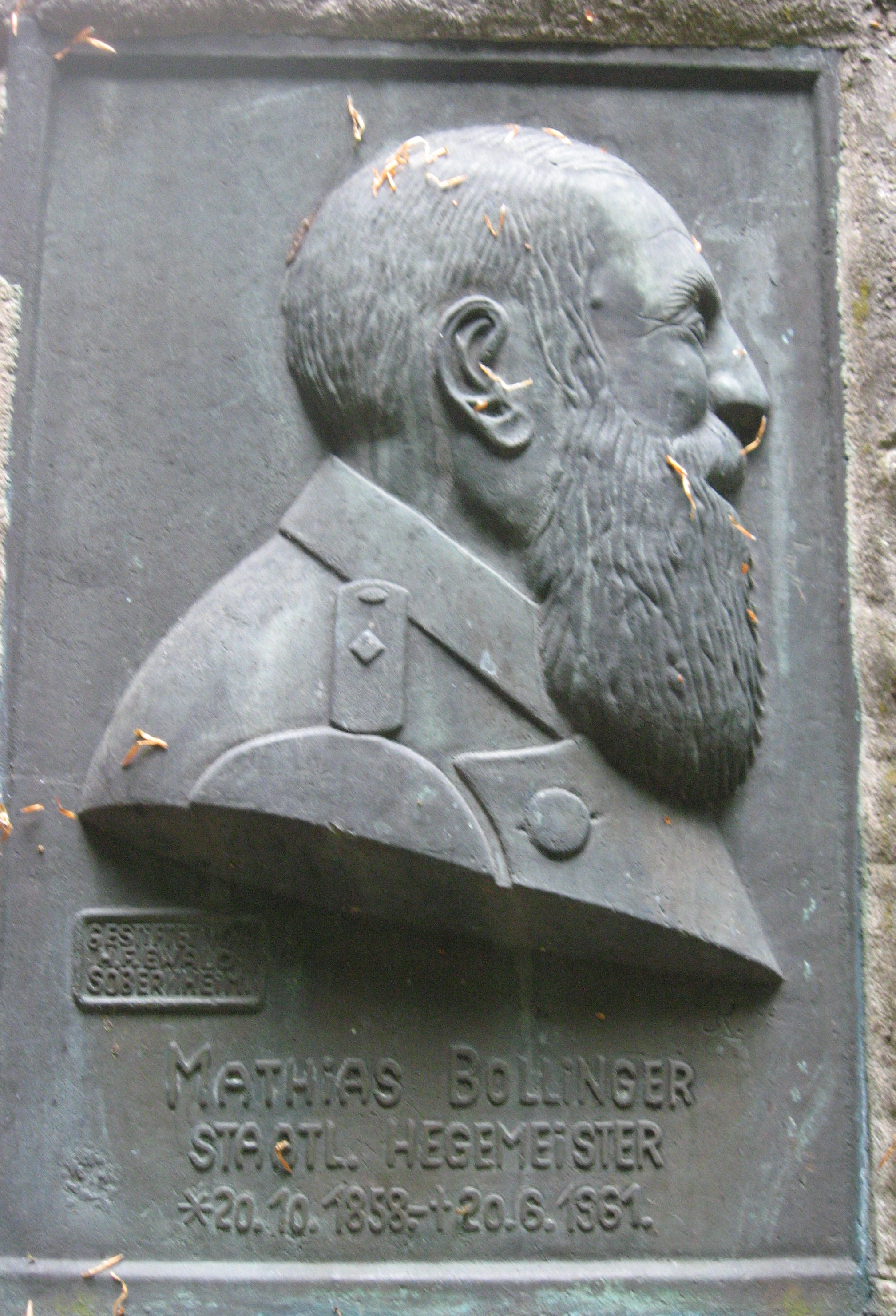 Hegemeister Mathias Bollinger